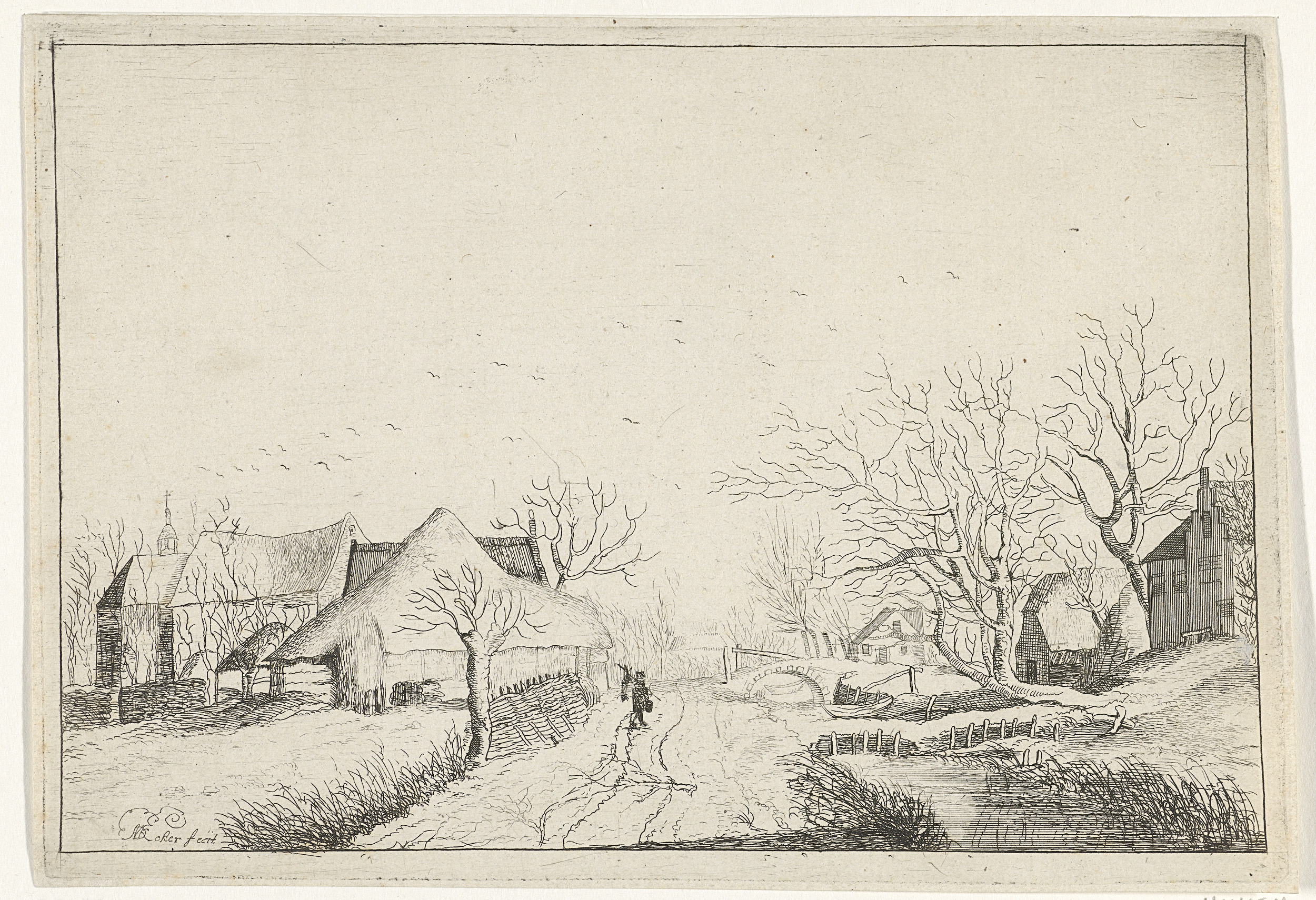 Wintergezicht door Anna Maria de Koker. Uit het Rijksprentenkabinet in het Rijksmuseum te Amsterdam.